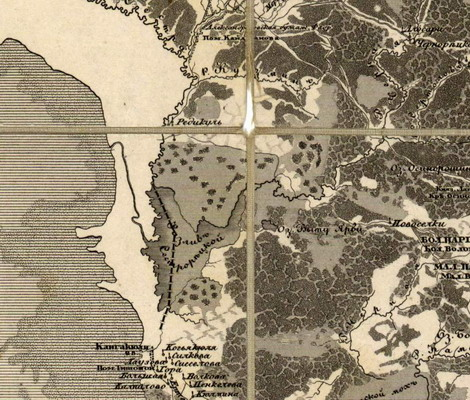 План Сестрорецкого Разлива в 1840 году